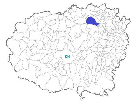 posizione del comune in provincia di Cuneo